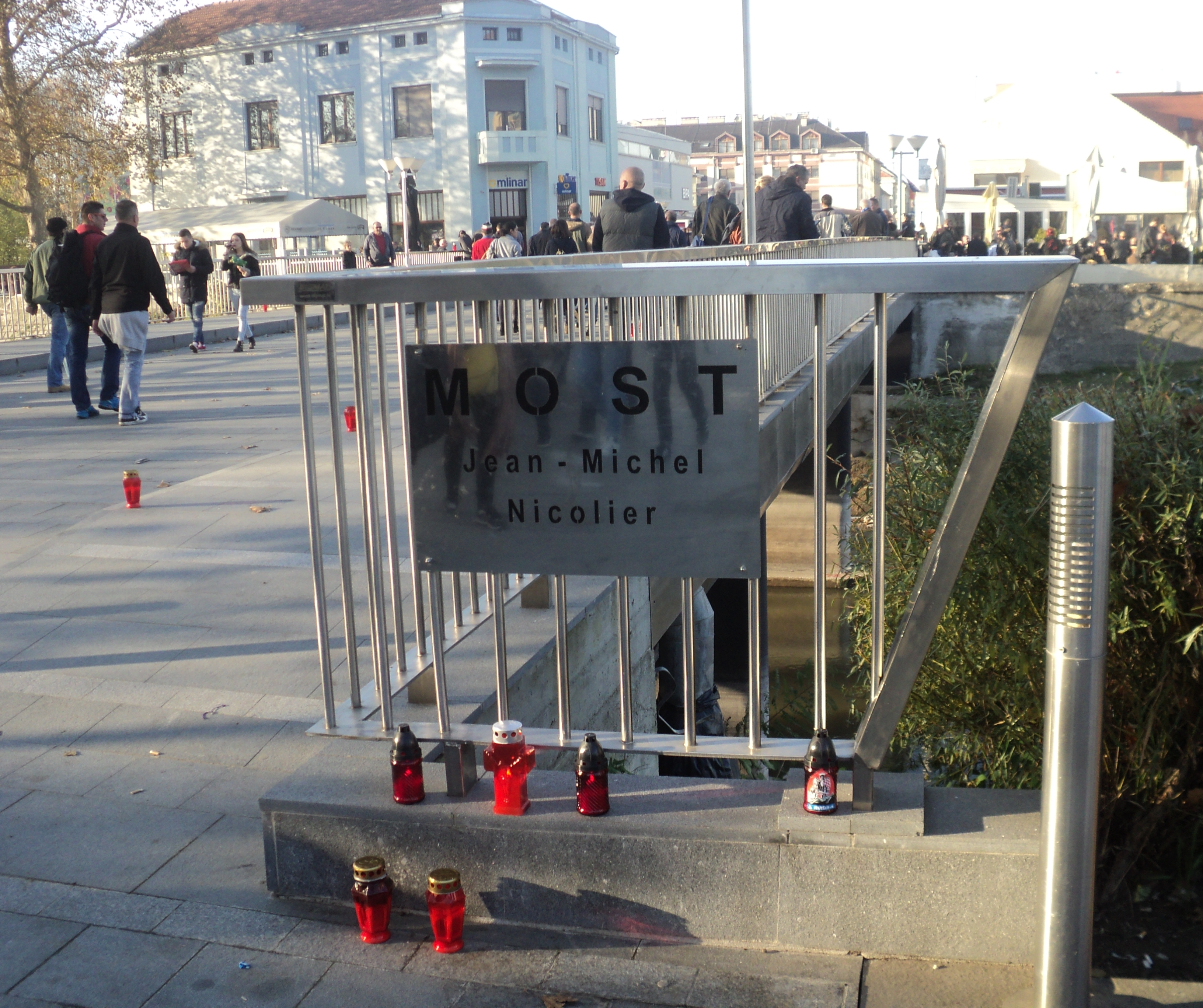 Most Jean - Michel Nicolier u Vukovaru 2016.